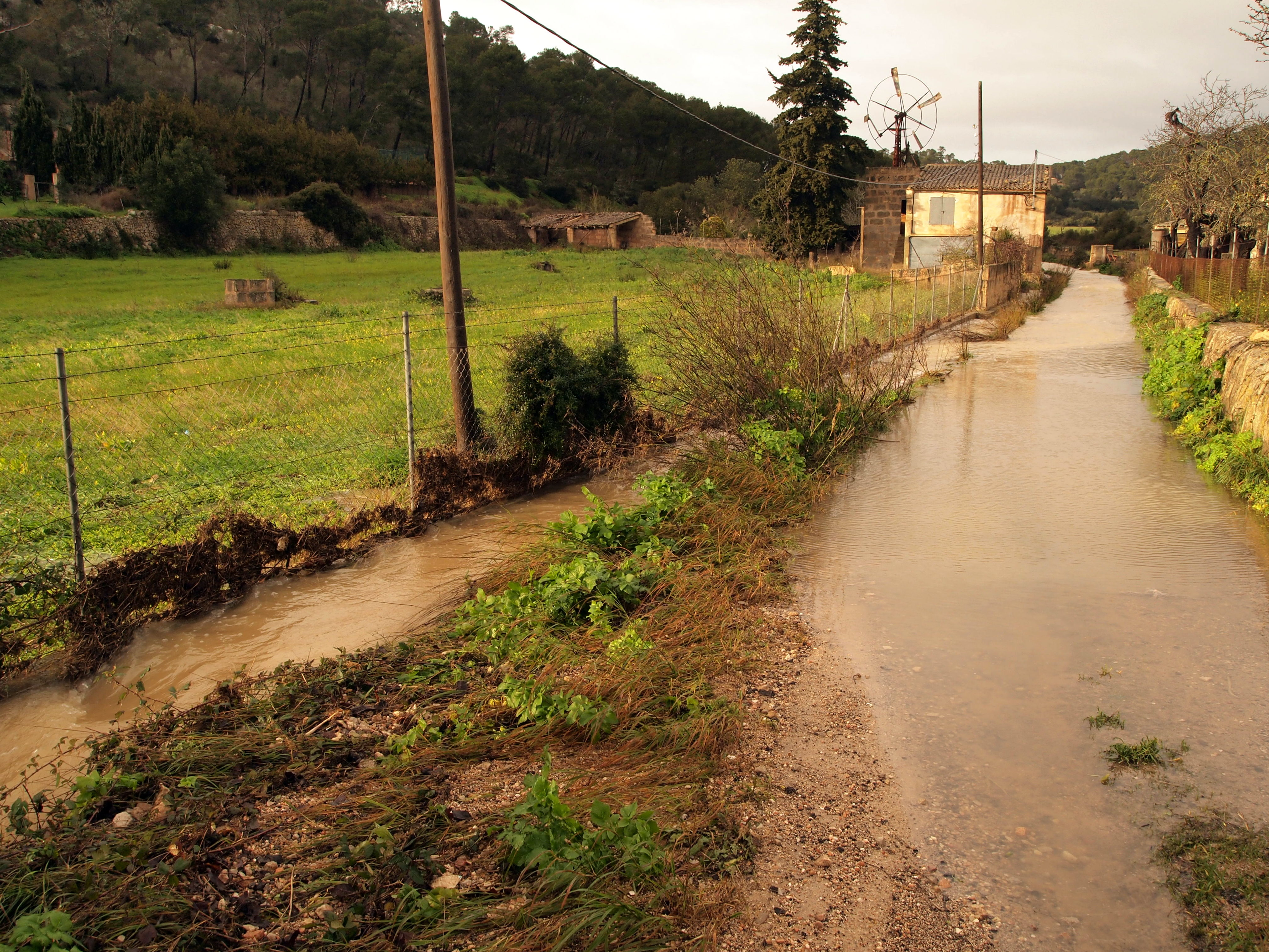 Torrent de Ferrutxelles que baixa de la Serra de Galdent, entre Llucmajor i Algaida (Mallorca) (21 gener 2017).